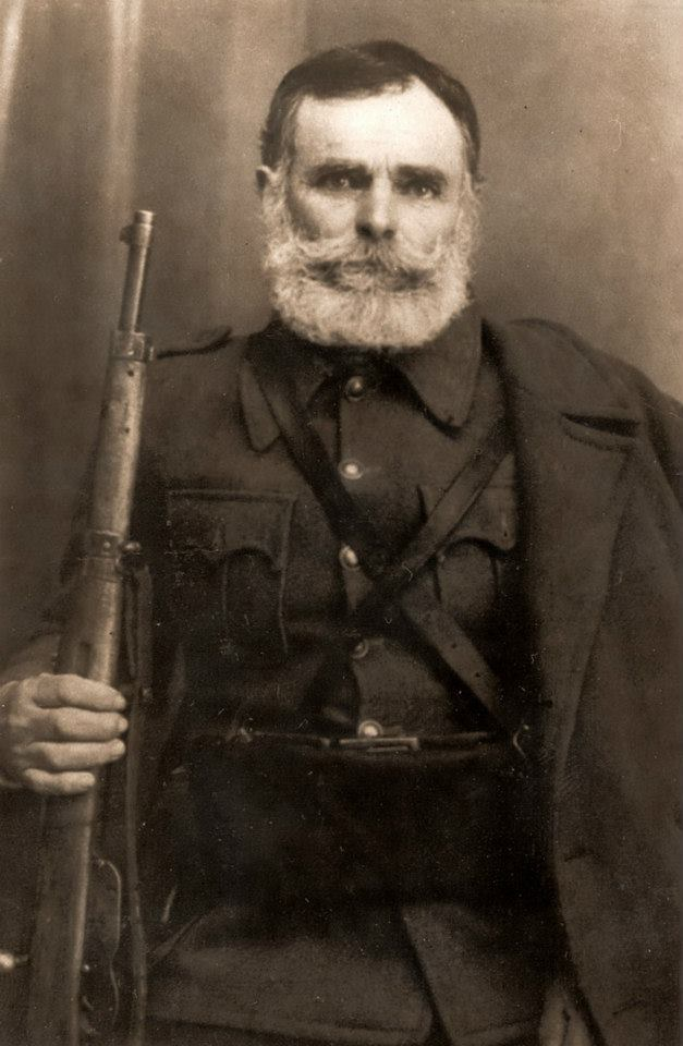 Ѓорѓи Мијаков попознат како Катиљ Ѓорѓи, Ѓорѓи Мијак, роден е во Мариовското село Брник во 1875 година. За време на османлиското владеење бил познат ајдук во мариовско. За него е напишана песната „Болен лежи Катил Ѓорѓи“, која на времето ја испеал Александар Сарев.